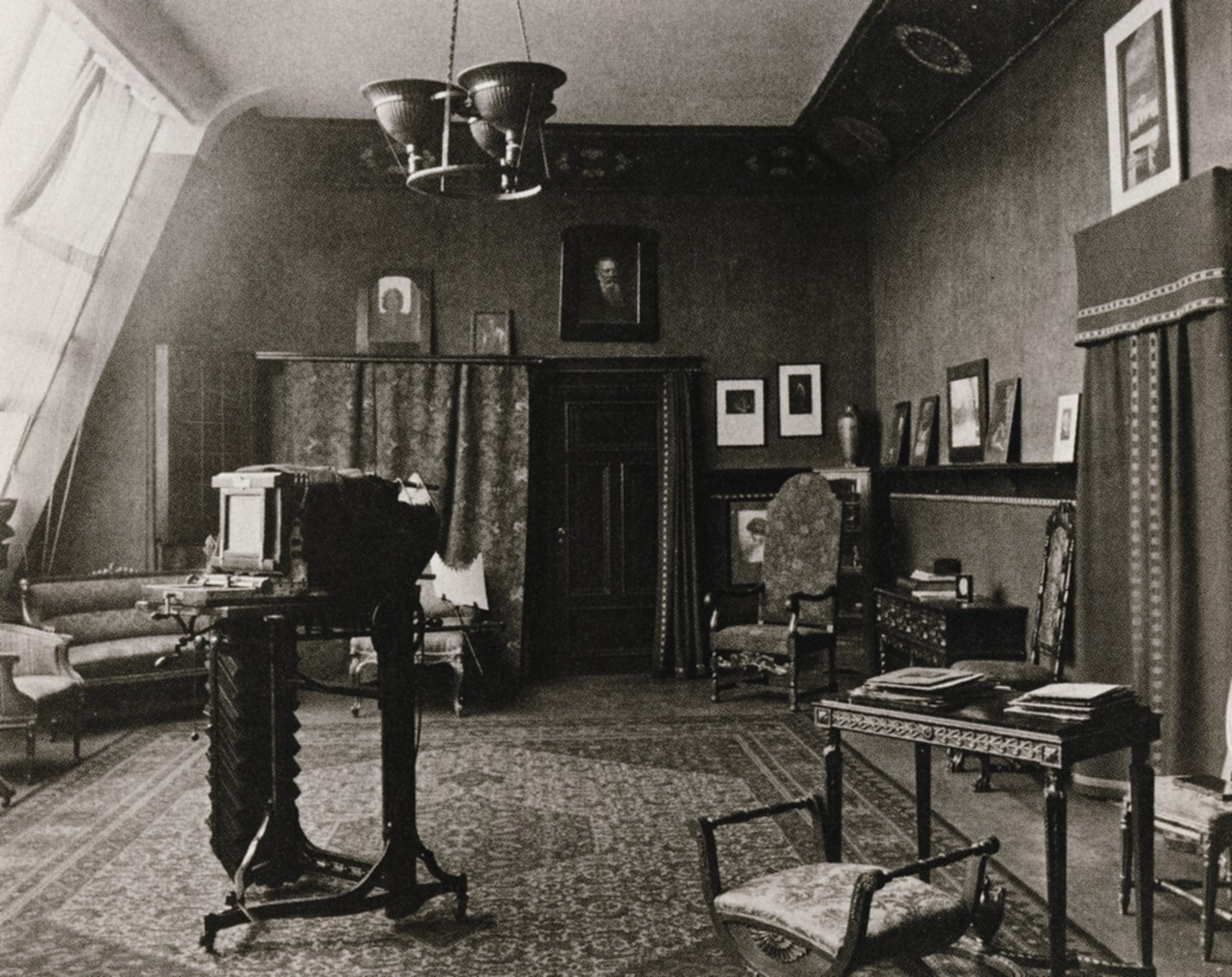 Ferdinand Flodins ateljé vid Hamngatan i Stockholm